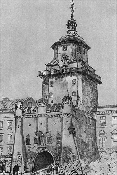 Brama Krakowska w Lublinie; litografia barwna; 44,5 x 29,7 cm; Muzeum Narodowe, Warszawa.